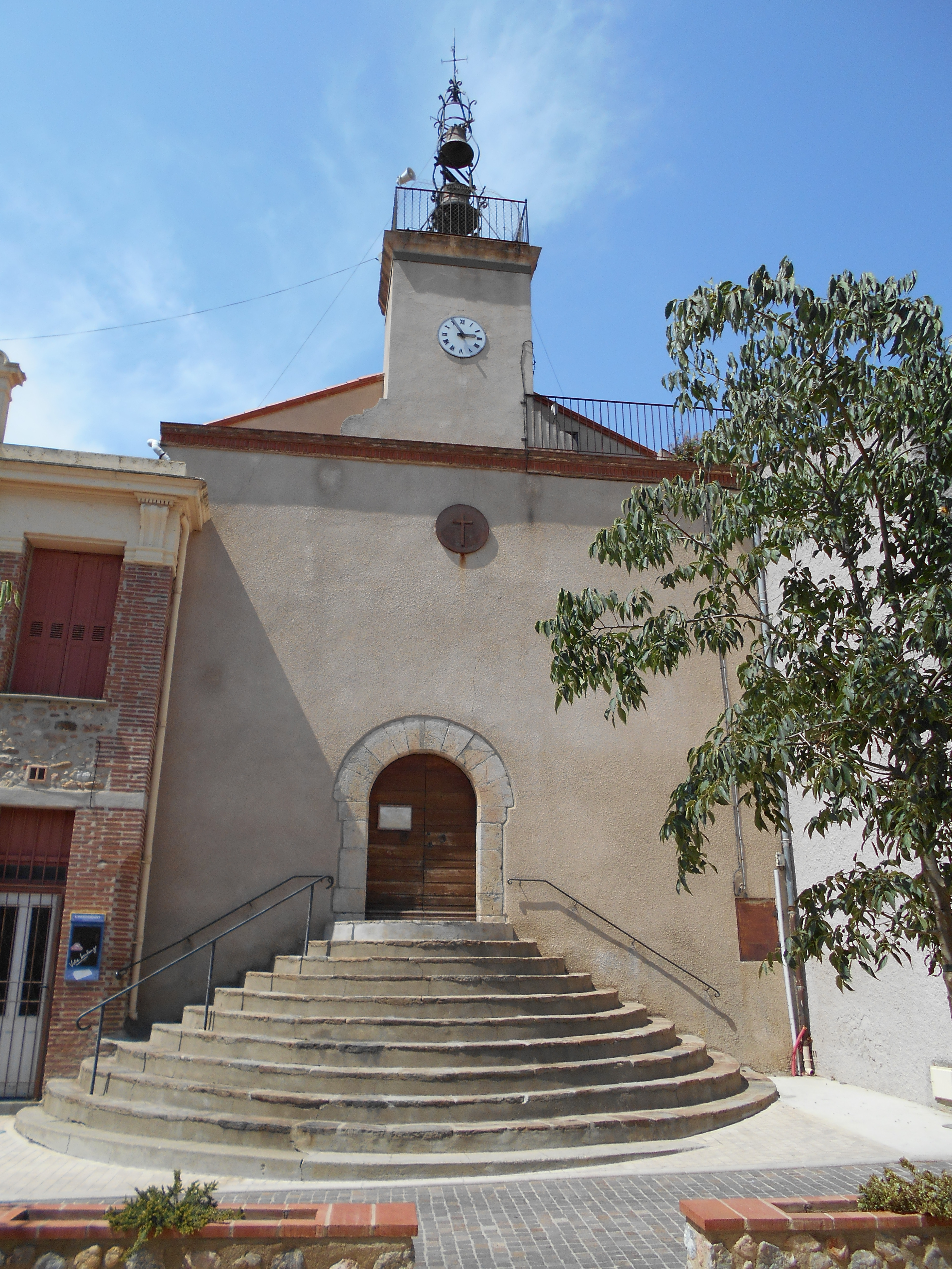 Sant Pere de Paçà